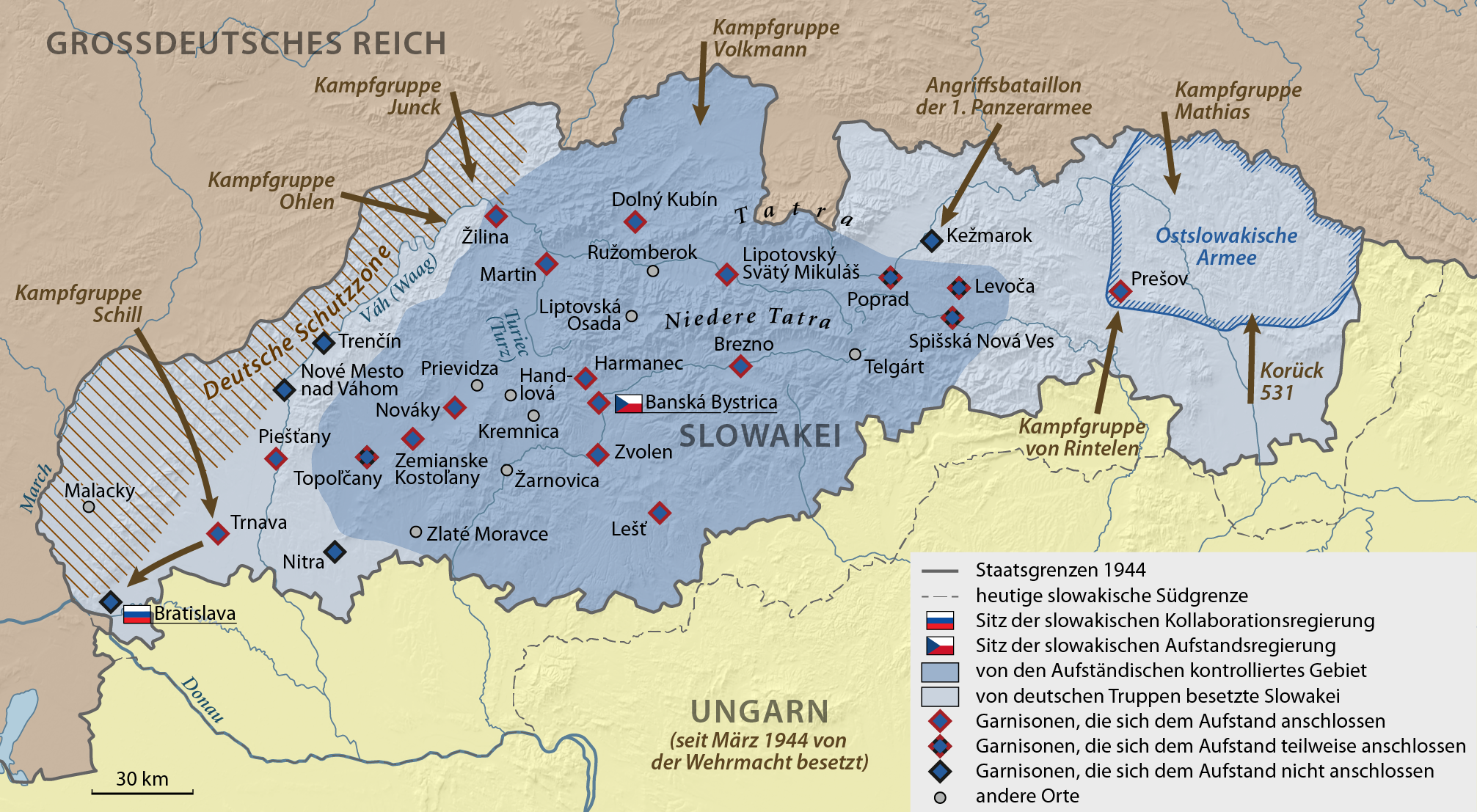 Karte zum Aufstandsbeginn des Slowakischen Nationalaufstands 1944